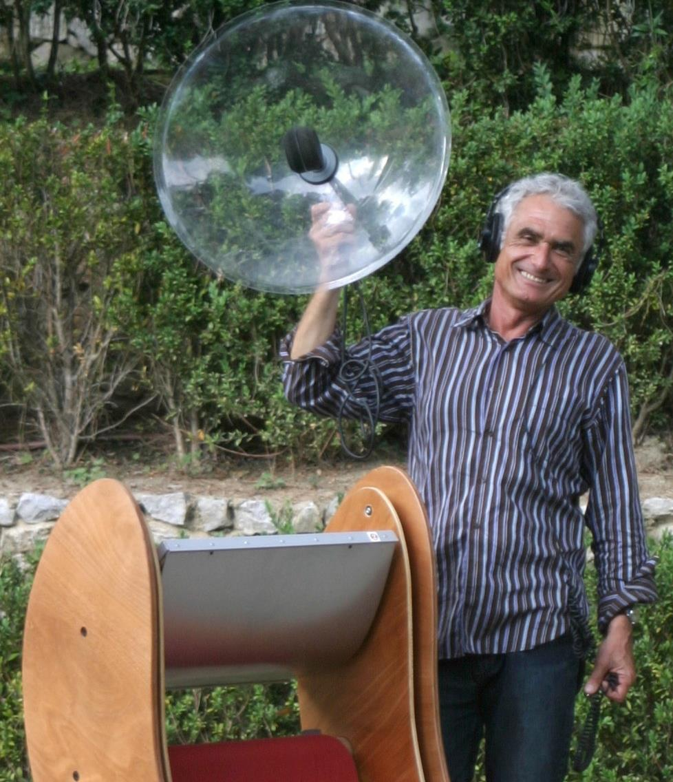 Michel Redolfi (2008). Devant un fauteuil audio-sensoriel "Sonoptère"—conception du studio Audionaute.